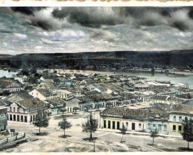 Centro Histórico